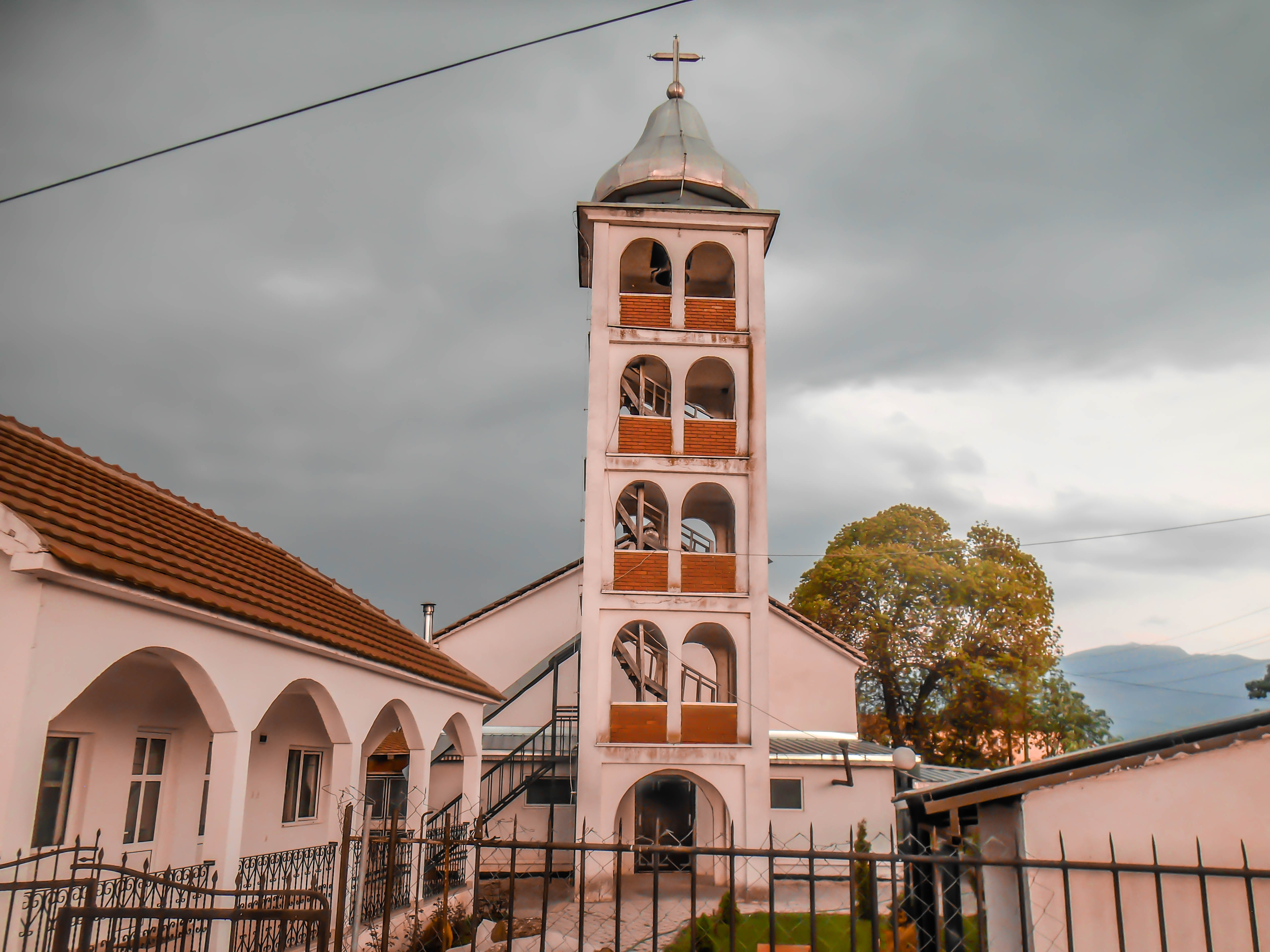 Црква „Рождество на Пресвета Богородица“ - Бориево